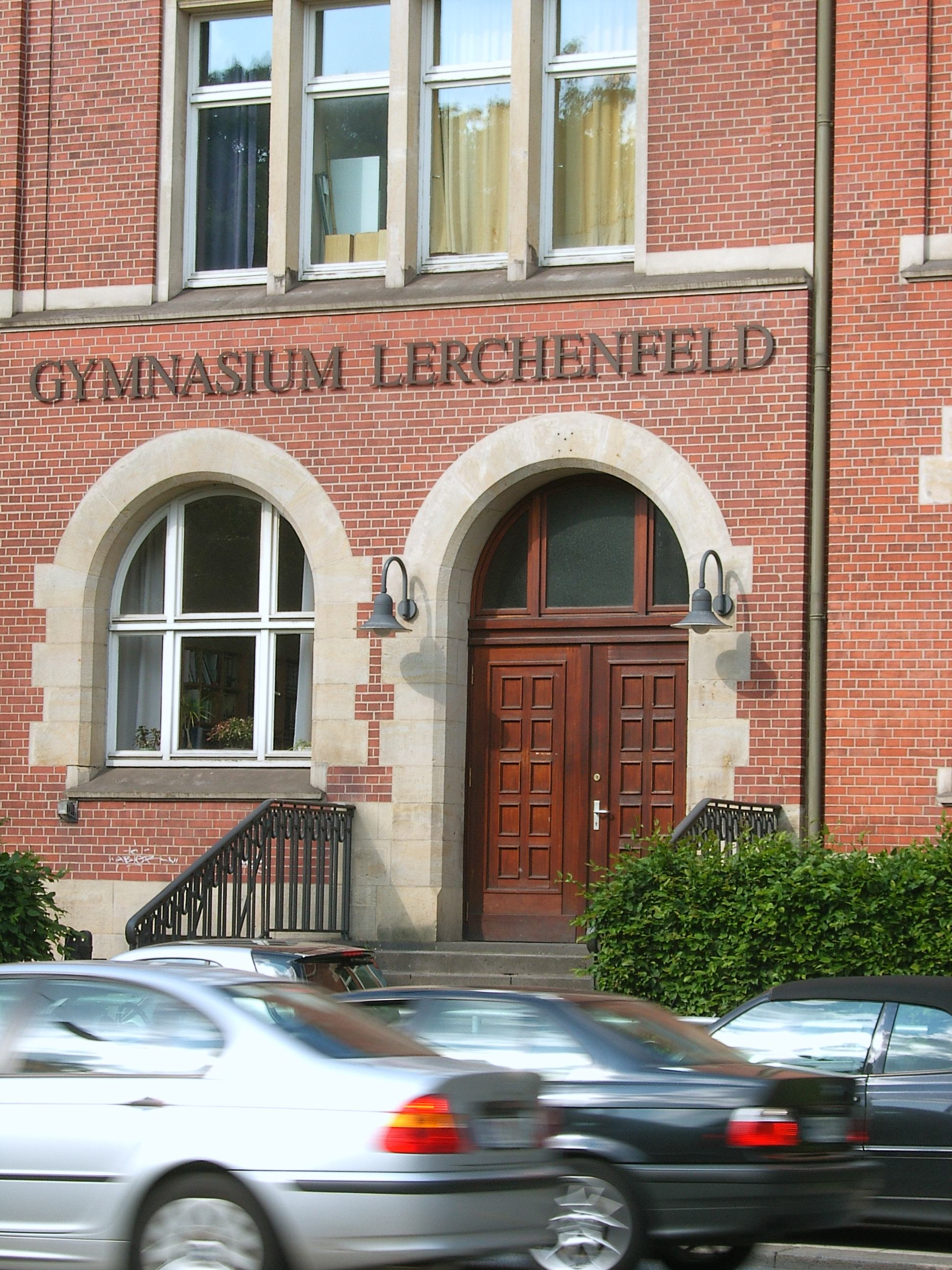 Hamburg, Uhlenhorst, Gymnasium Lerchenfeld